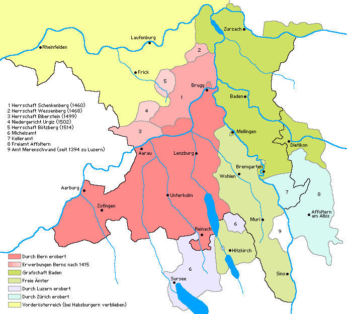 Der Aargau nach der Eroberung durch die Eidgenossen